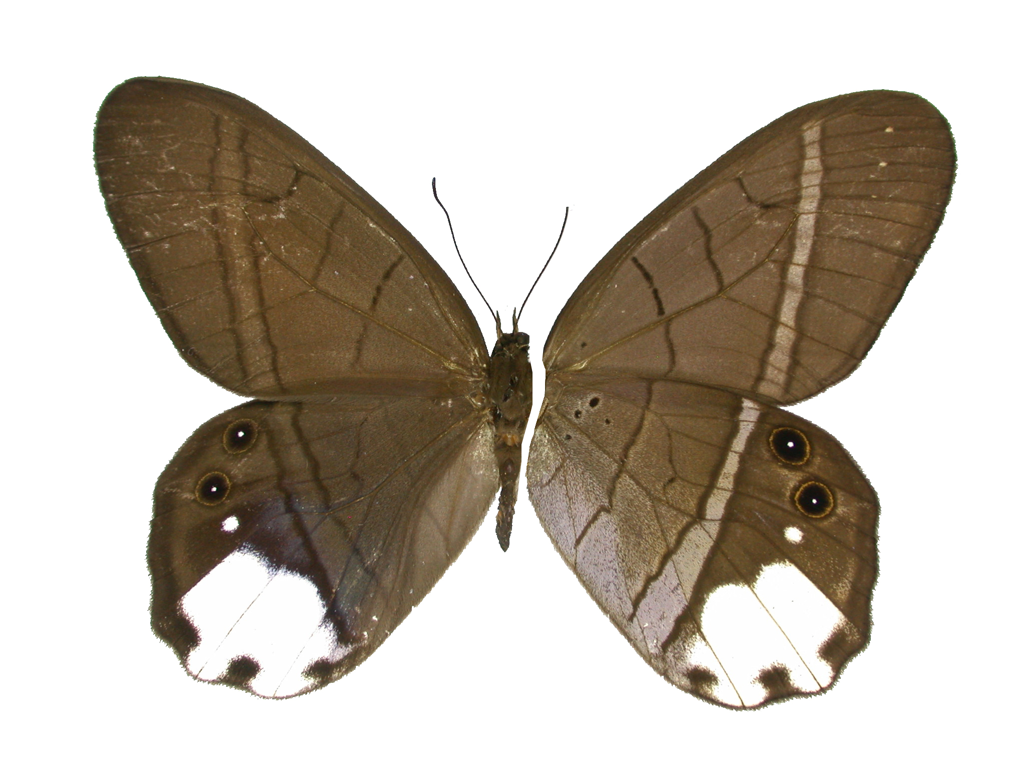 Nymphalidae Ecuador